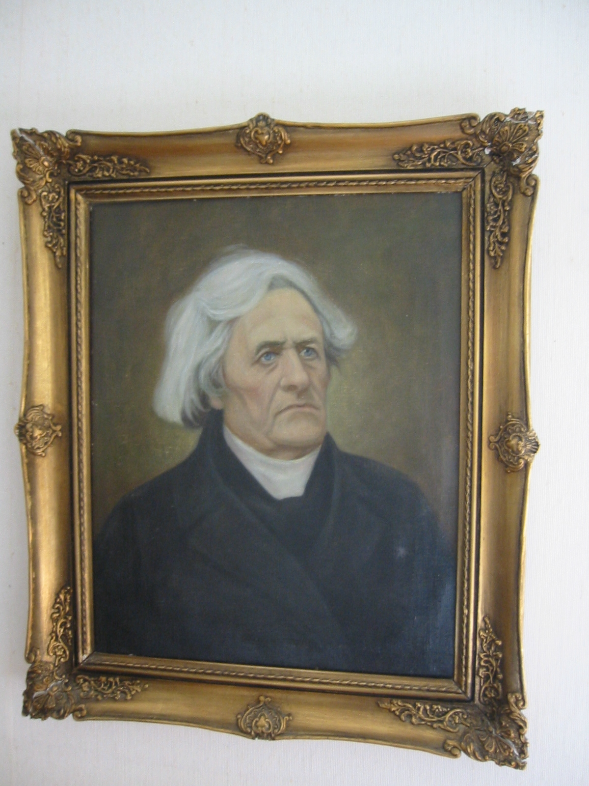 Samuel Roos (1792-1878), lääketieteen ja kirurgian tohtori, suomalainen sanaseppä